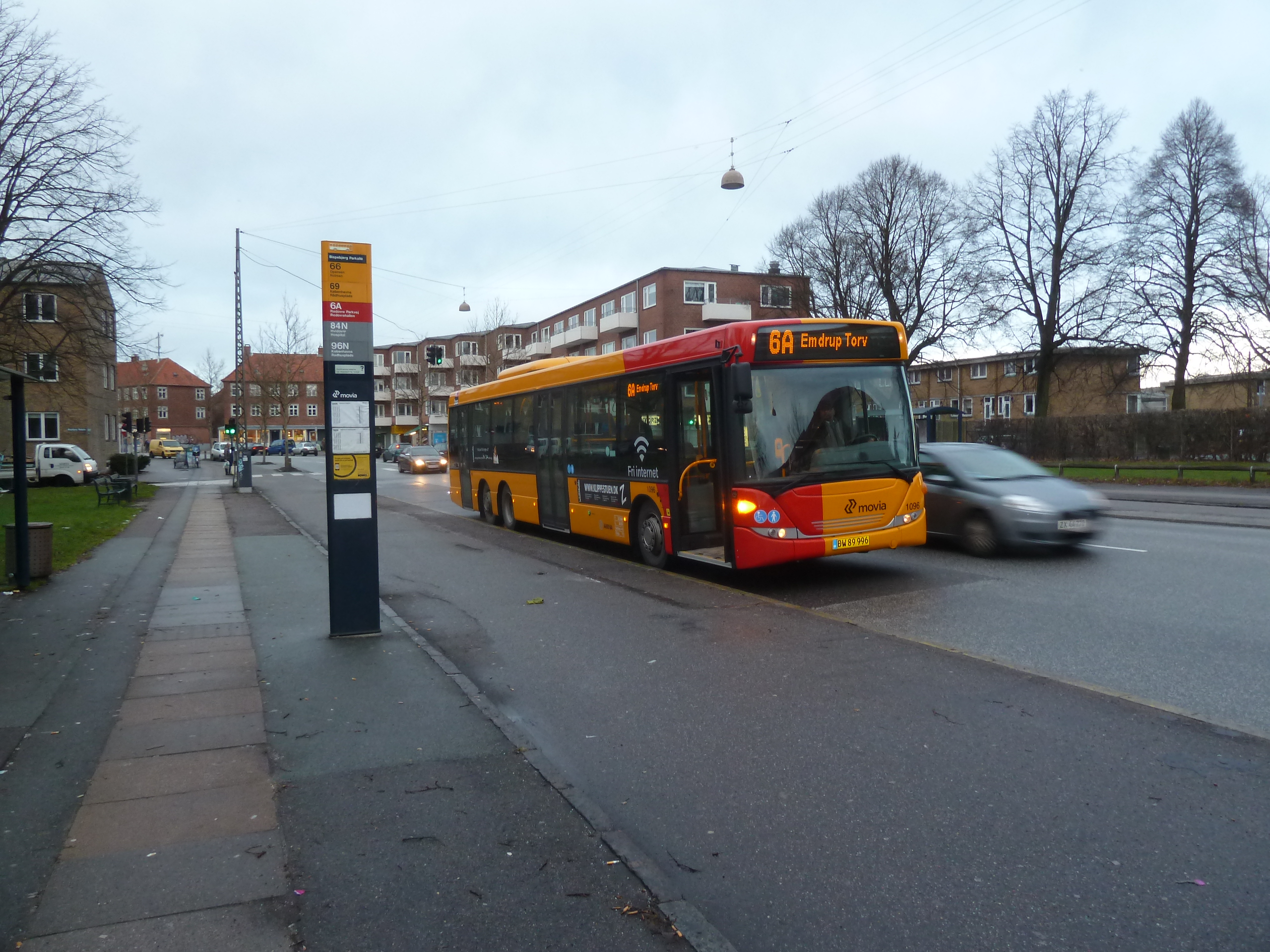 Bus line 6A on Frederiksborgvej in Copenhagen.